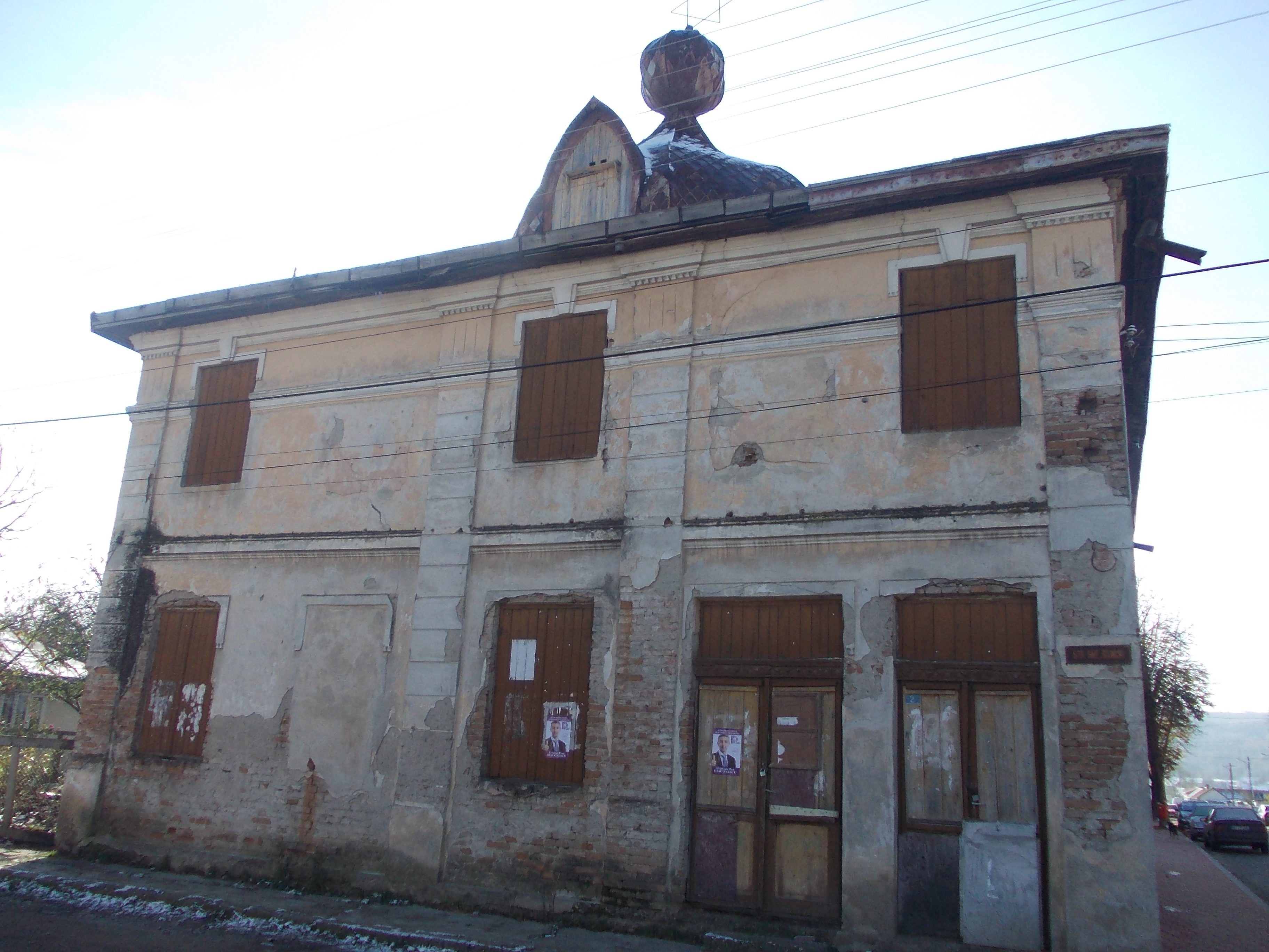 sinagoga din Săveni,Bt